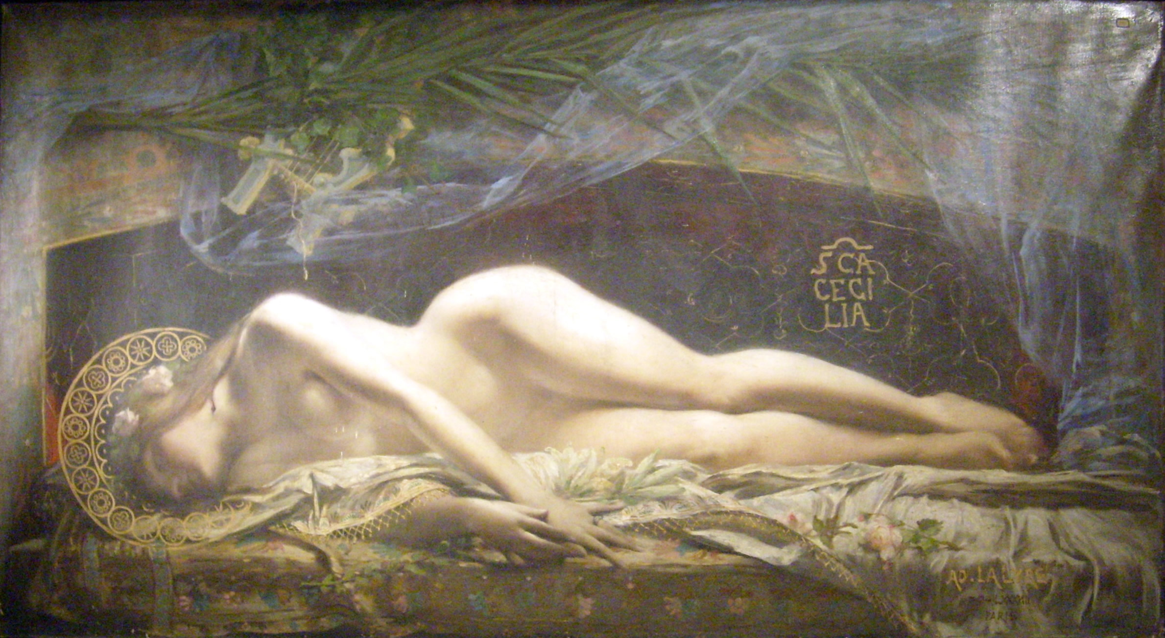 Sainte Cécile lors d'une exposition au Musée Thomas-Henry, Cherbourg-Octeville